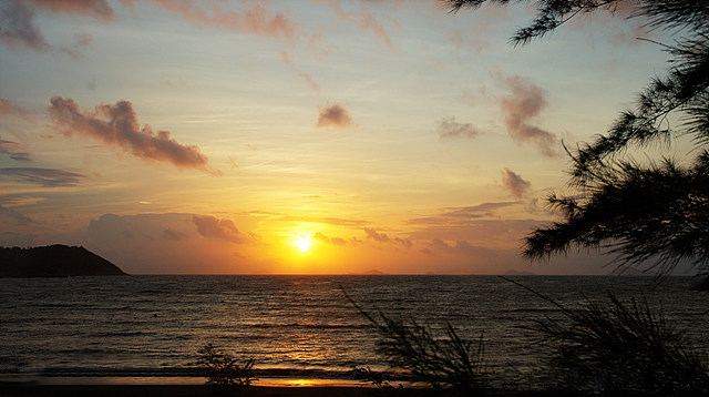 黑沙灘美景--日出